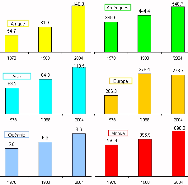 Image réalisée par mes soins (Sources : Bureau des statistiques de l'Église catholique)